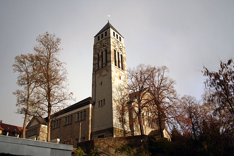 Die reformierte Kirche des Zürcher Quartiers Oberstrass mit ihrem markanten Steinturm.